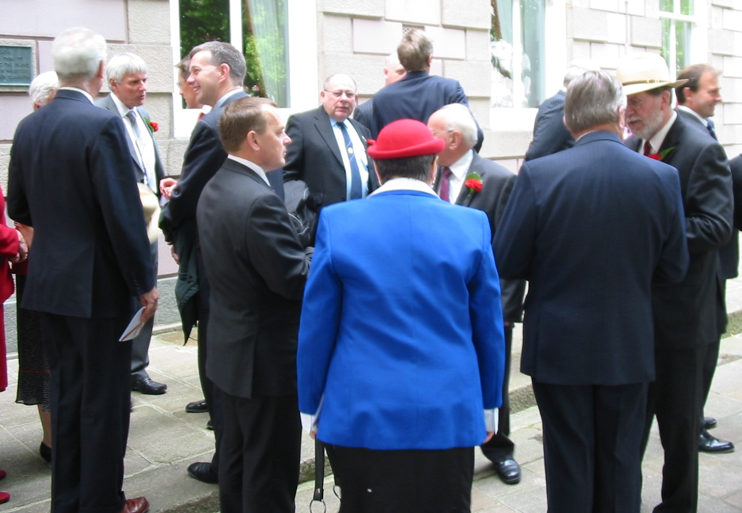 Nrf: Jour d'la Libéthâtion, Jèrri, 9 d'Mai 2009